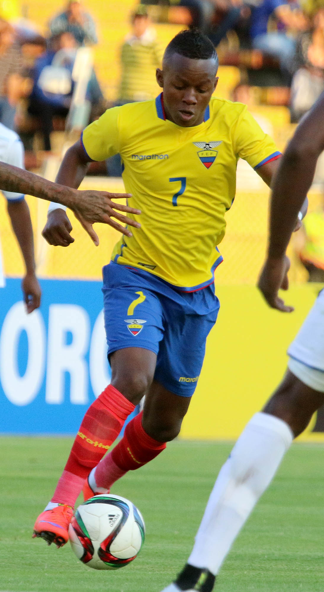 Quito, 08 de sept. (Andes).-Ecuador enfrenta a Honduras en partido amistoso jugado en el estadio Olimpico Atahualpa. En la gráfica Juan Cazares (7) de Ecuador, lleva el balón ante la marca de Henry Figueroa (17) de Honduras Foto:César Muñoz/Andes